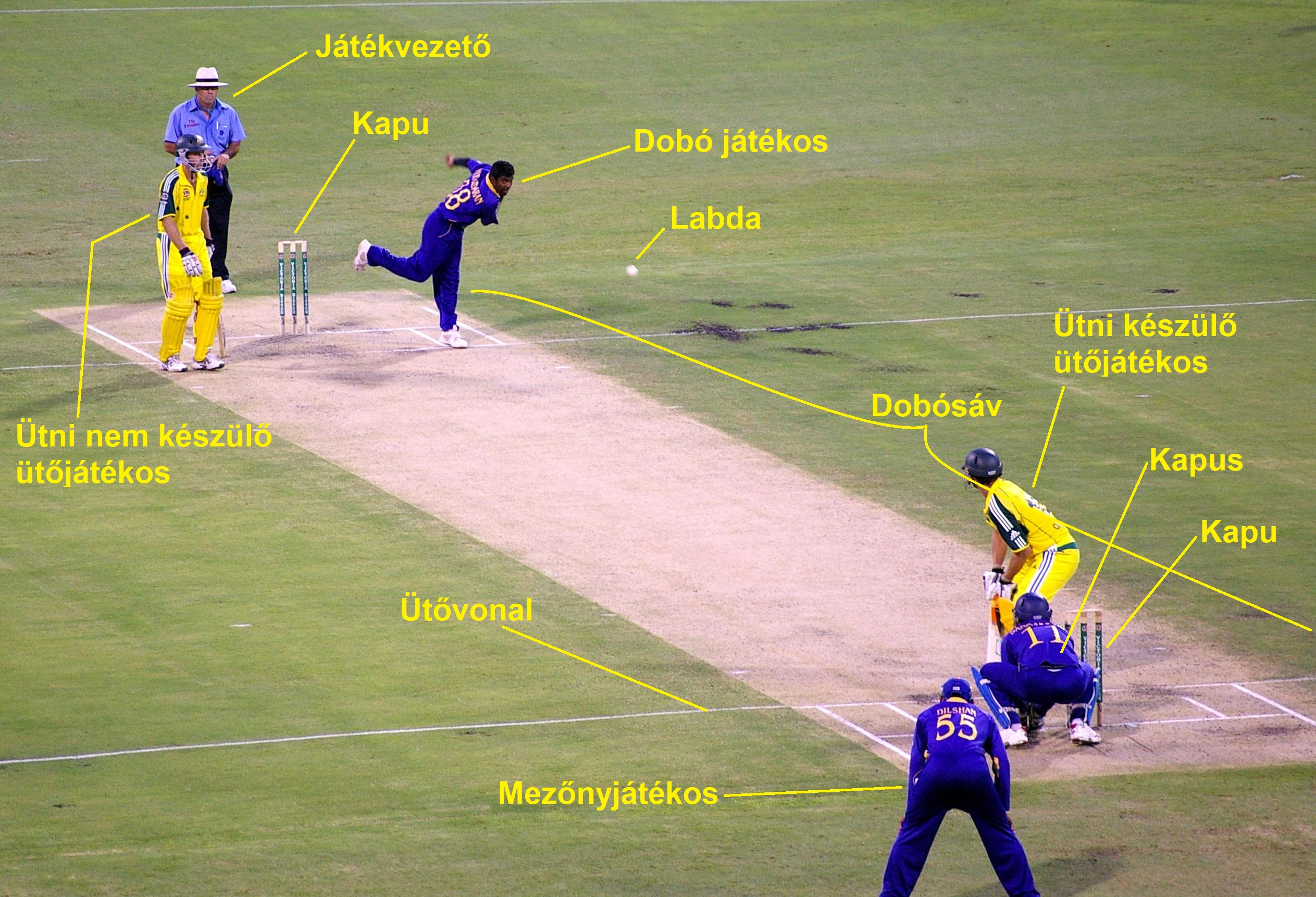 Dobás a krikettben magyar feliratokkal